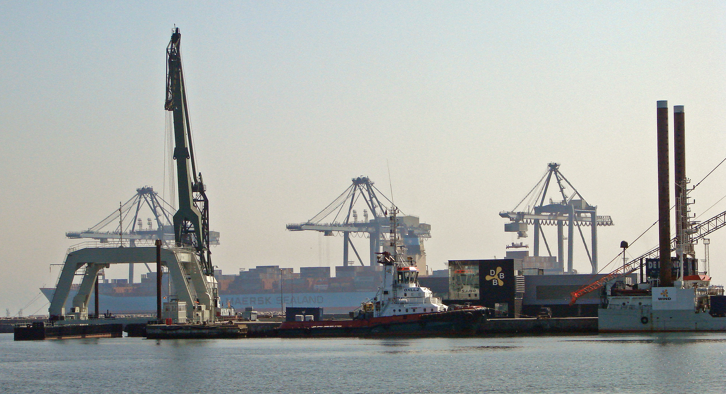 Århus Havn